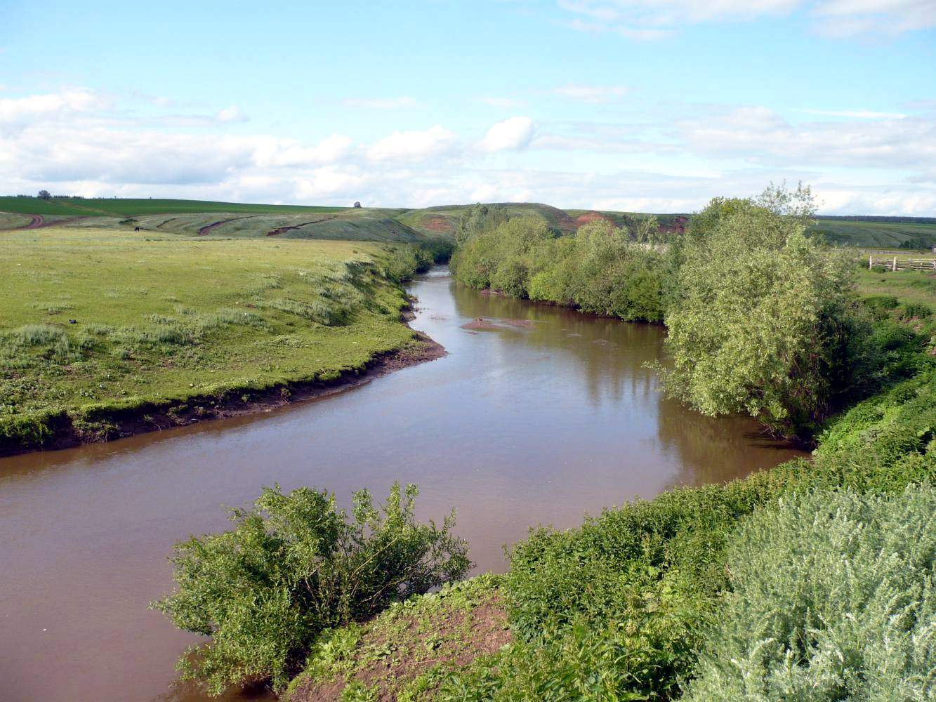 Река Большая Сульча: Аксубаевский район, Татарстан This image is related to the protected area of Russia number 1610012